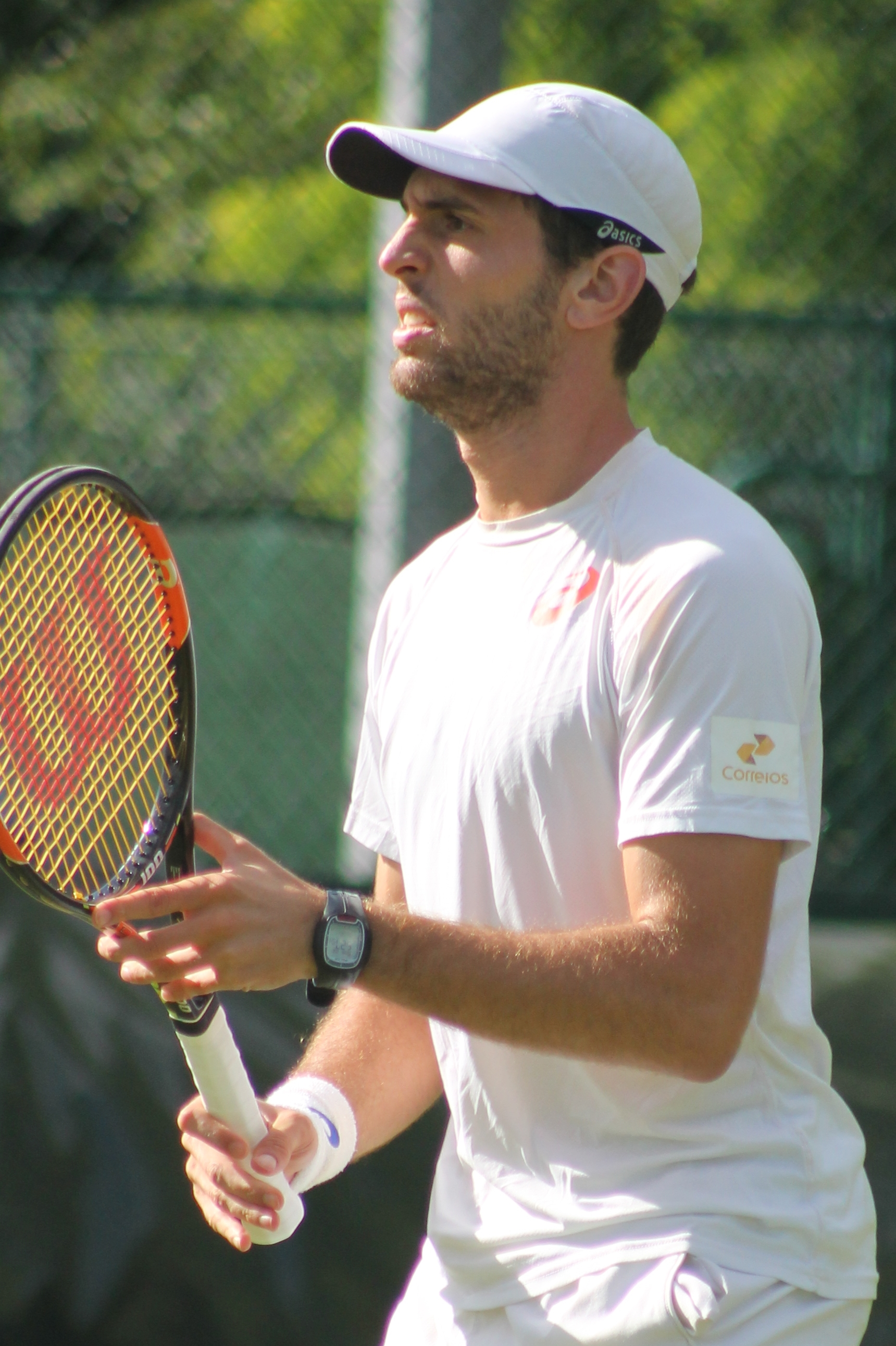 Clezar WMQ15 (2)